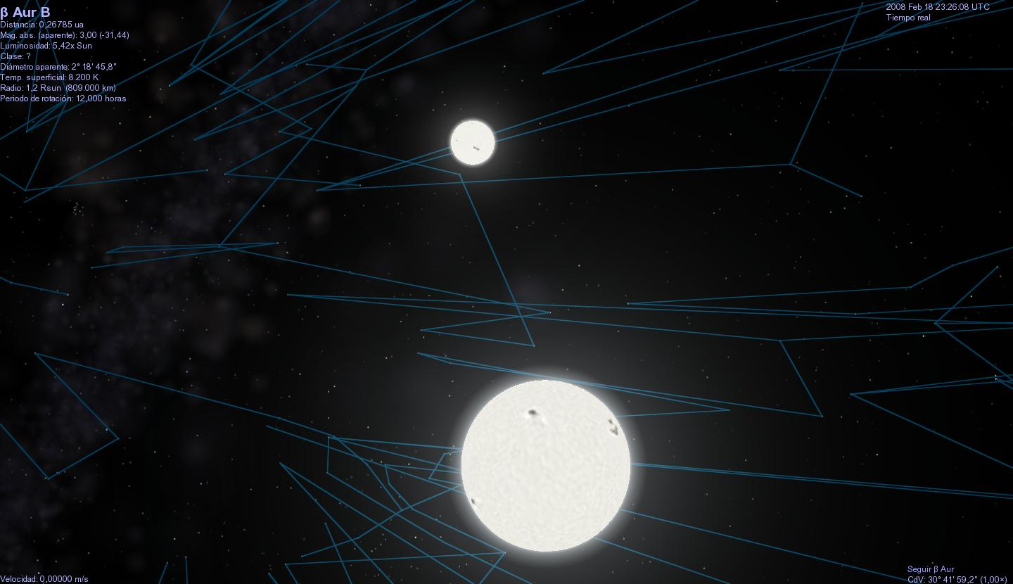 Imagen del programa Celestia , de la estrella Menkalinan.